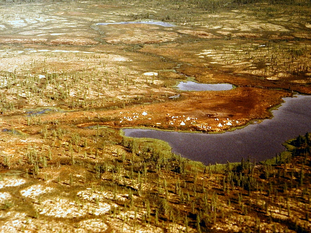 Лесотундра с вертолёта